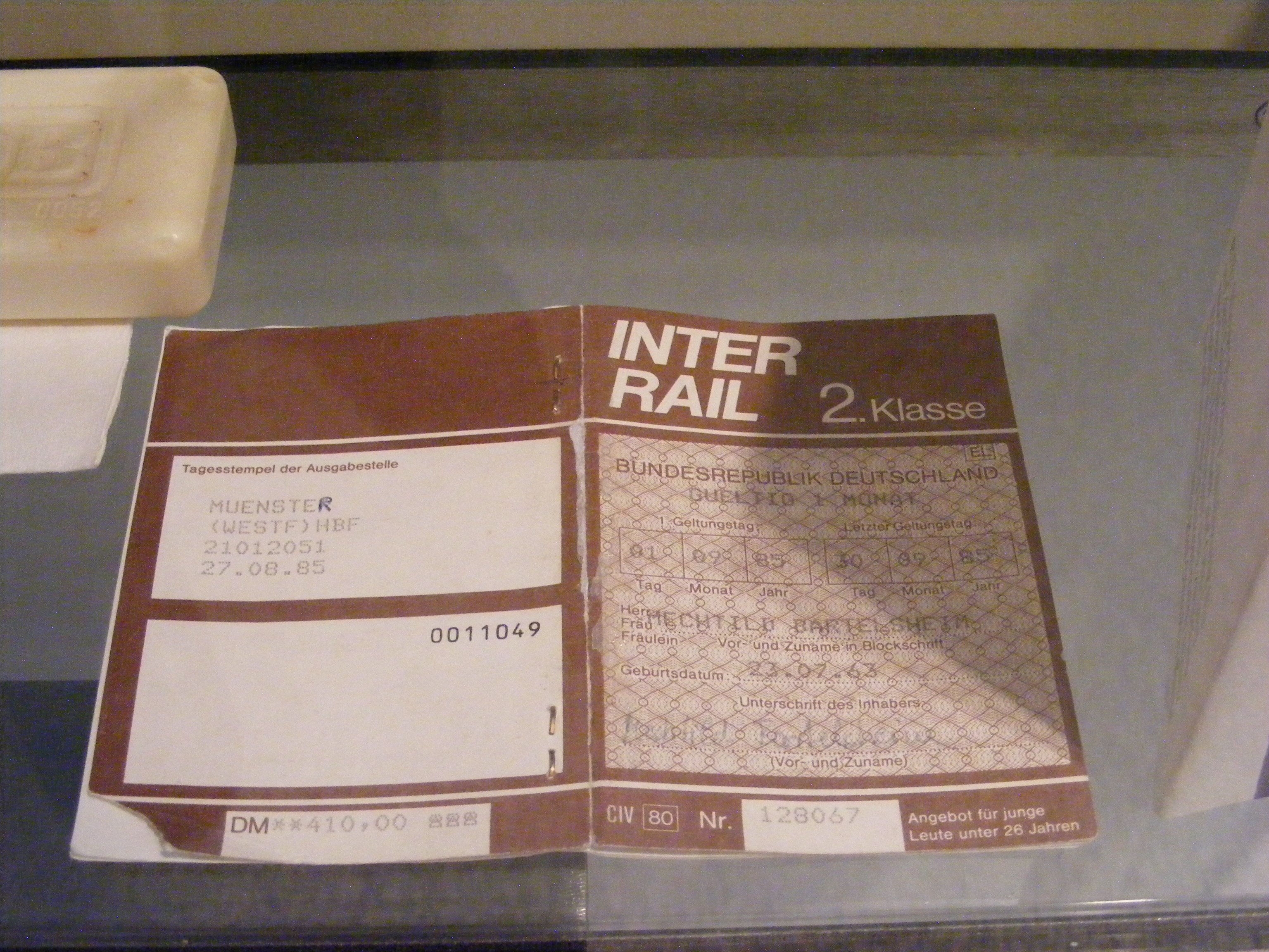 InterRail-Fahrkarte (DB, 1985), DB Museum Nürnberg